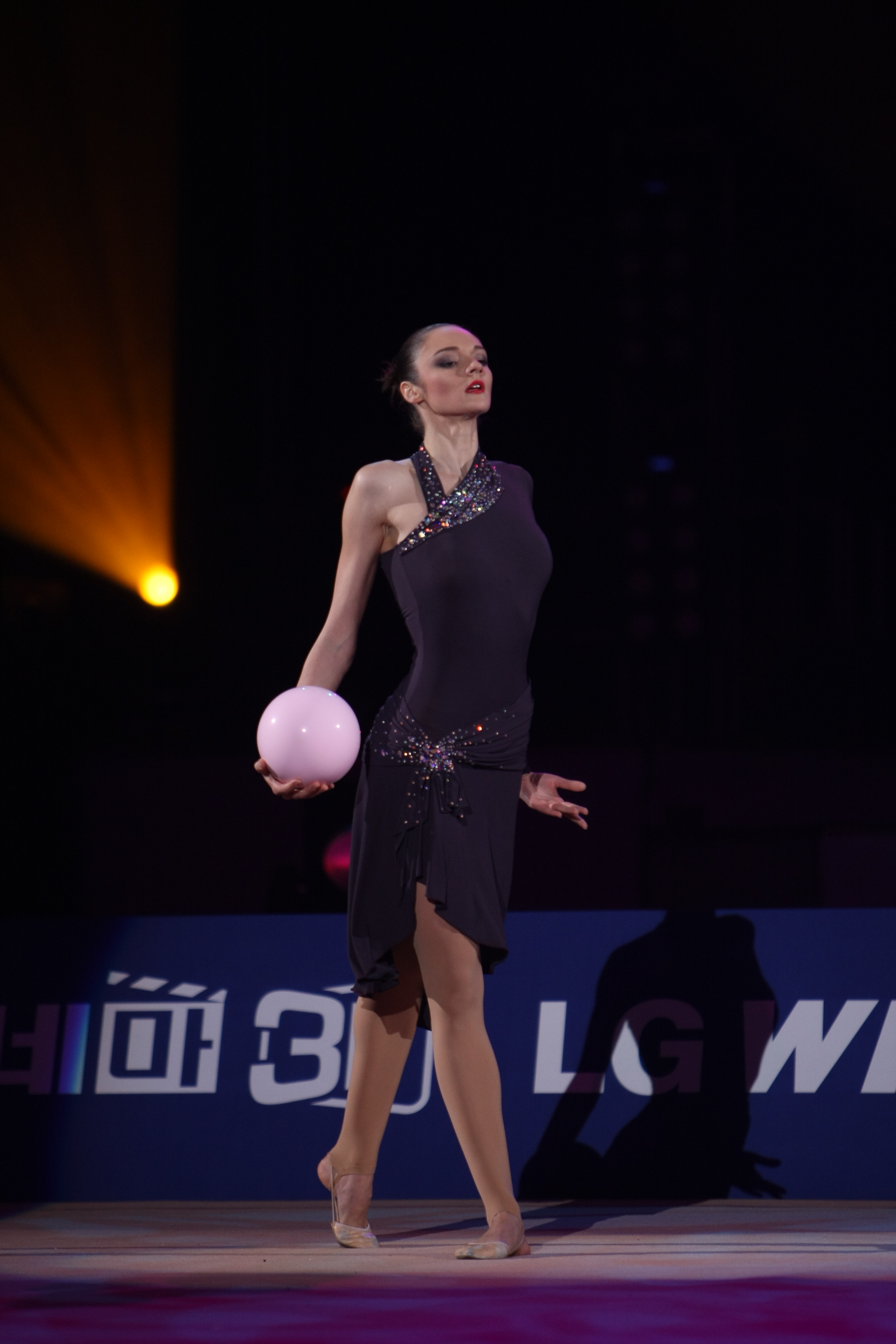 LG전자가 11일(土, 오후 3시), 12일(日, 오후 2시) 양일간 고려대학교 화정체육관 특설무대에서 국내 최초 리듬체조 갈라쇼인 ‘LG WHISEN Rhythmic All Stars 2011’ 행사를 개최했다. 사진은 11일 고려대학교 화정체육관 특설무대에서 열린 ‘LG WHISEN Rhythmic All Stars 2011’ 행사에서 LG ‘휘센’ 광고모델인 손연재(18세, 세종고) 선수를 비롯해 국내외 전•현역 리듬체조 스타들이 총출동해 멋진 리듬체조를 보여줬다.